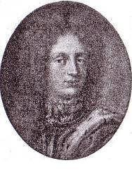 Pfalzgraf Friedrich Wilhelm von Neuburg (1665-1689)